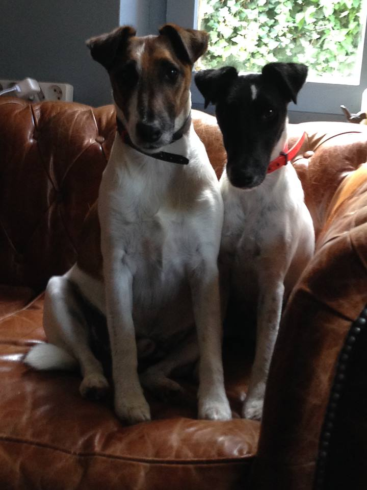 Male Fox Terrier trois couleur et femelle tête noir corps blanc